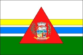 Bandeira do município de Carneirinho, Minas Gerais, Brasil.